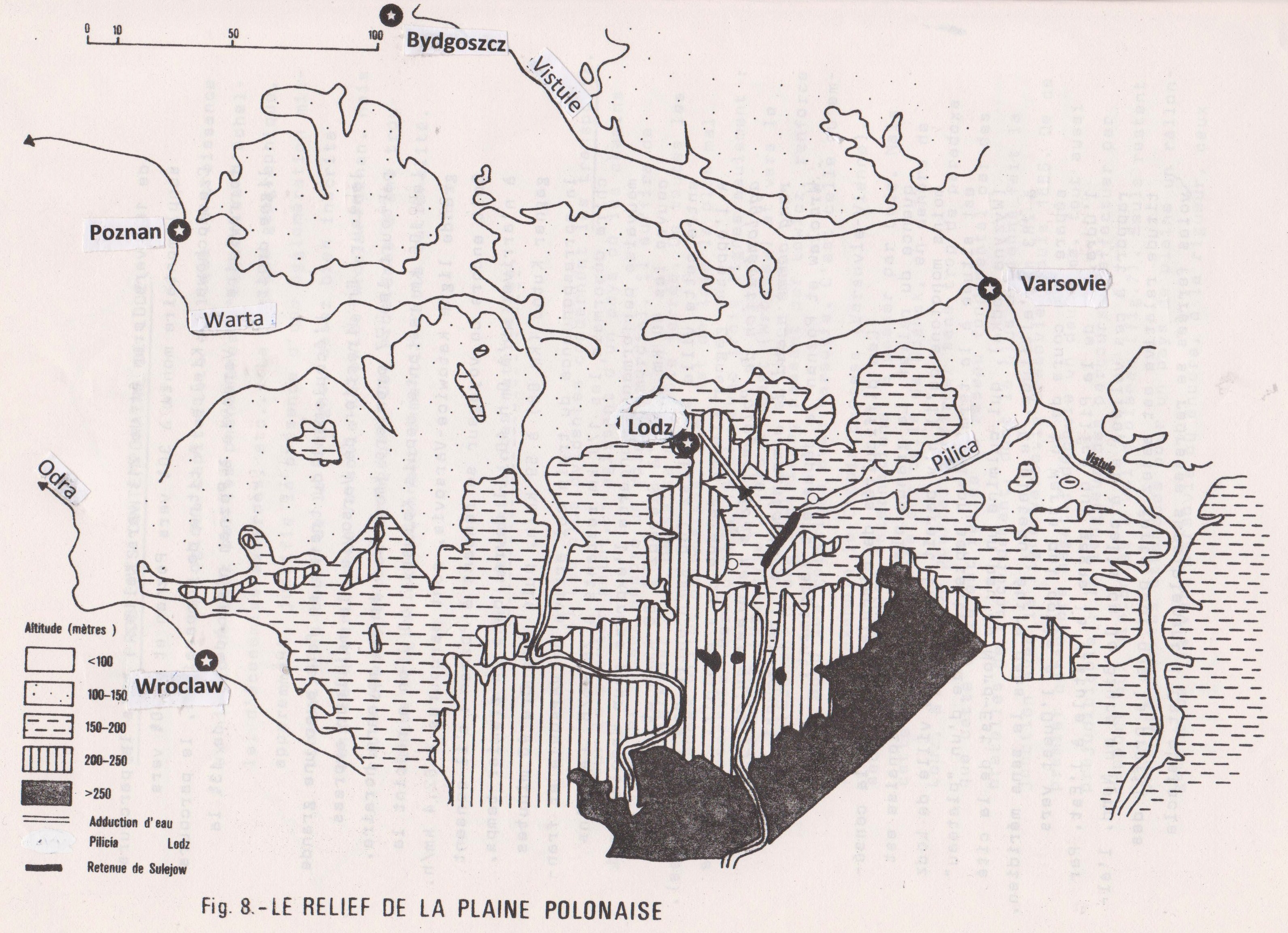 Carte de la plaine polonaise : alignements morainiques au sud, chenaux d'écoulement fluvio-glaciaire au sud